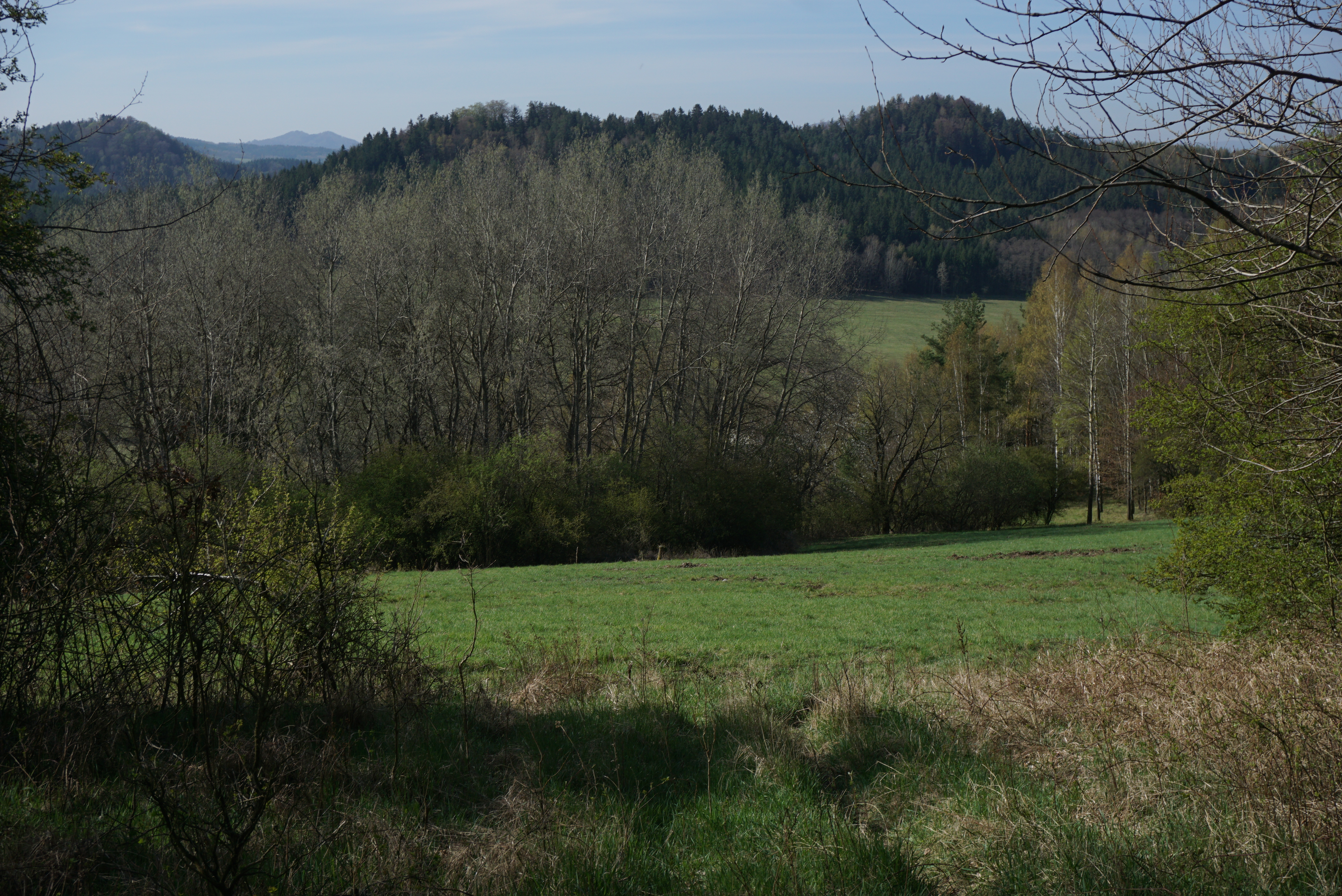 Buková (Buchberg, 472 m) a Pískové návrší (Sand-Berge, 485 m) ze svahu Kostelního vrchu u Jítravy, v pozadí mezi kopci Velký a Malý Jelení vrch